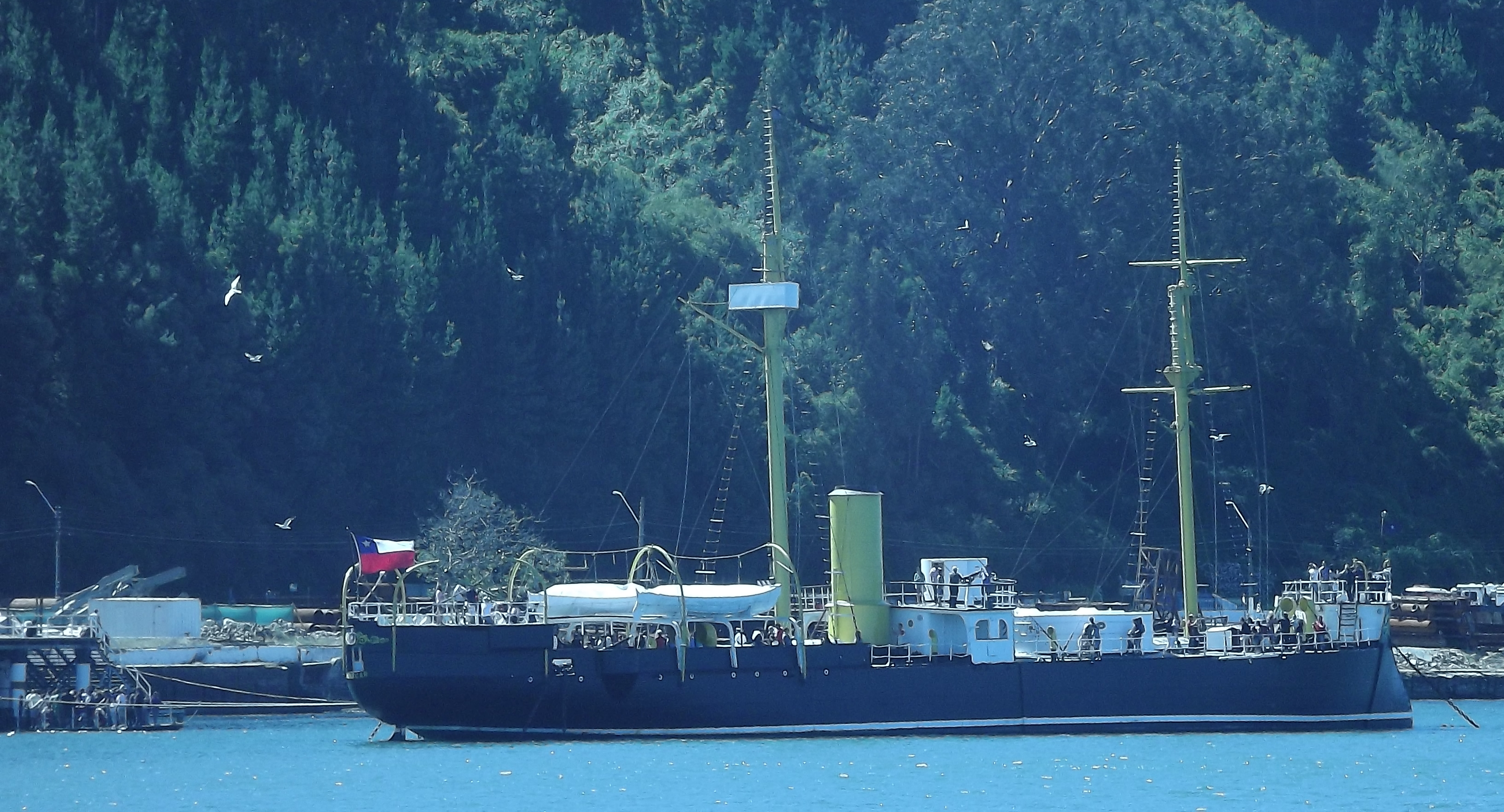 El Huascar